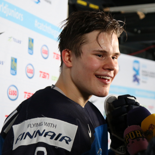 Jesse Puljujärvi haastateltavana nuorten mm-kisoissa 2016 This file has been extracted from another file: Jesse-Puljujärvi.jpg